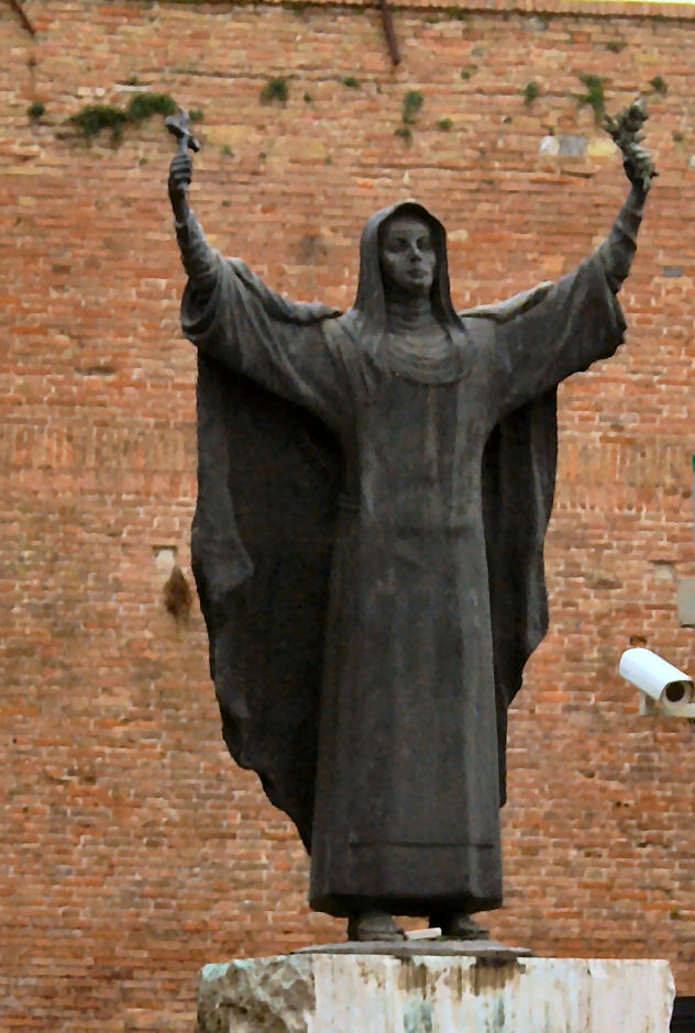 Den hellige Katharina af Siena, statue ved la Fortezza, Siena